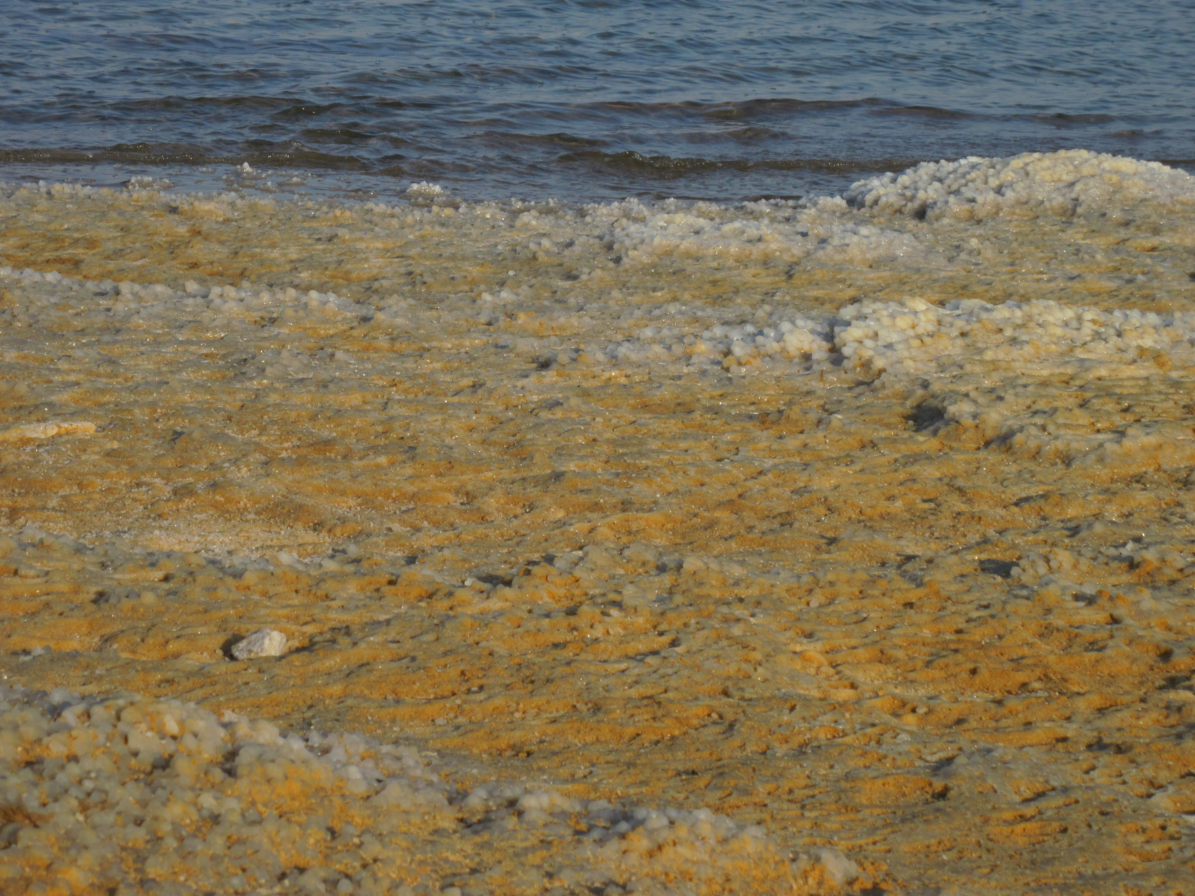 גבישי מלח בחוף ים המלח